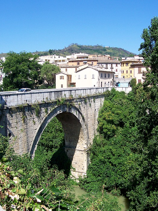 Ascoli Piceno - Ponte di Solestà